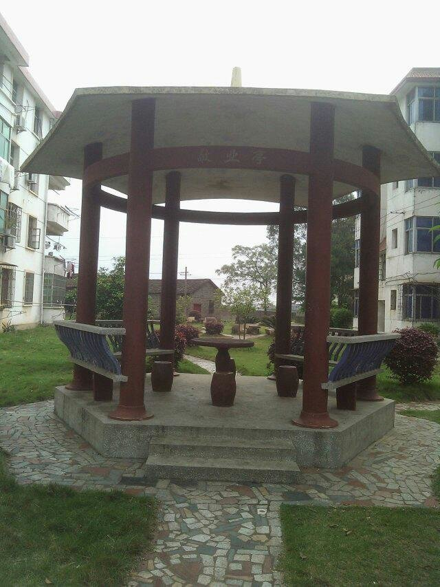 泰和县第二中学_敬业亭